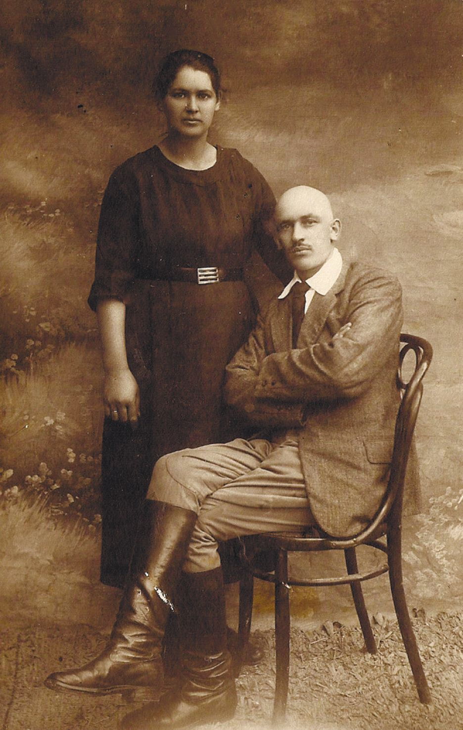 פרנץ ואן דר הורן עם גיסתו יהודית הורביץ